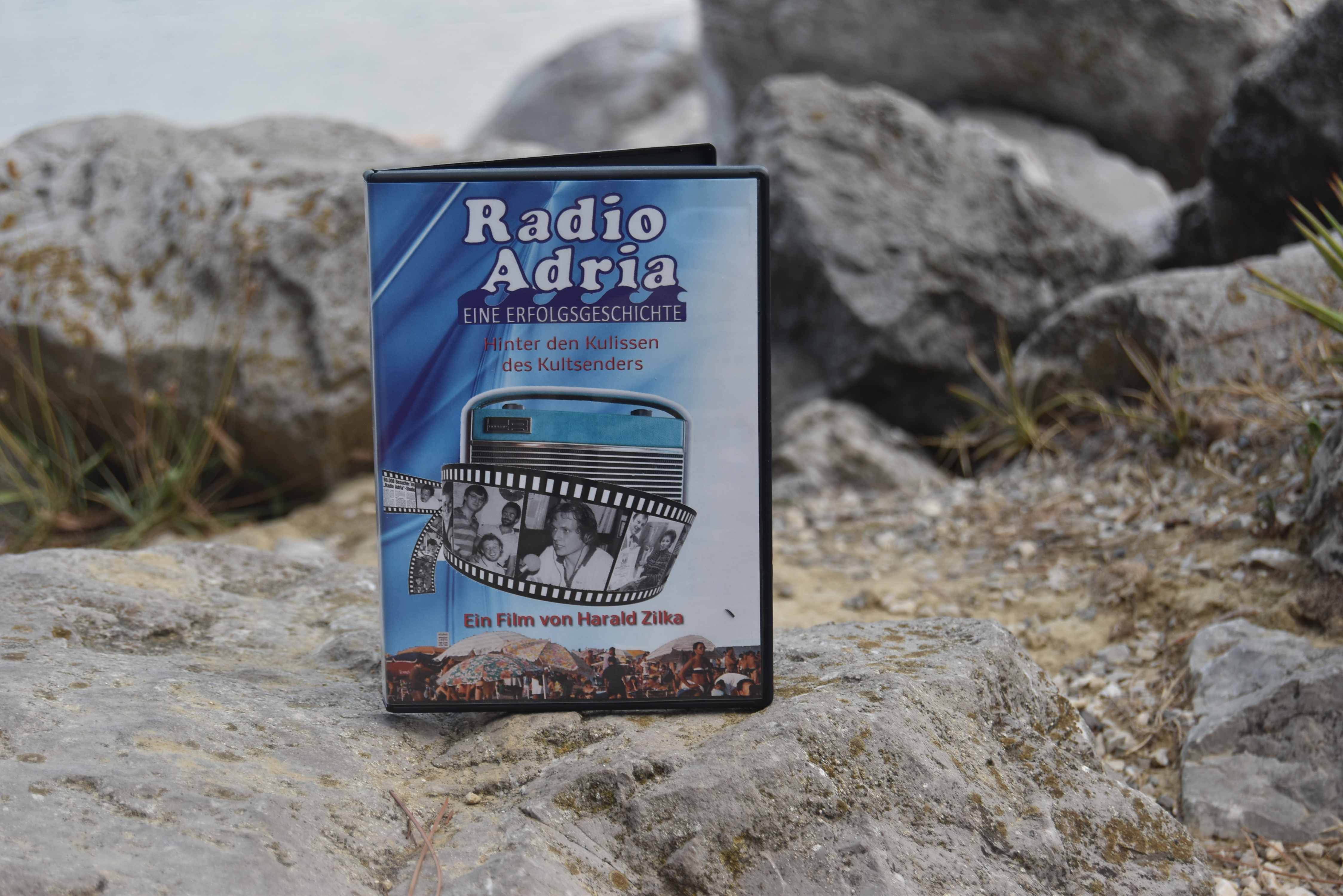 DVD in Grado